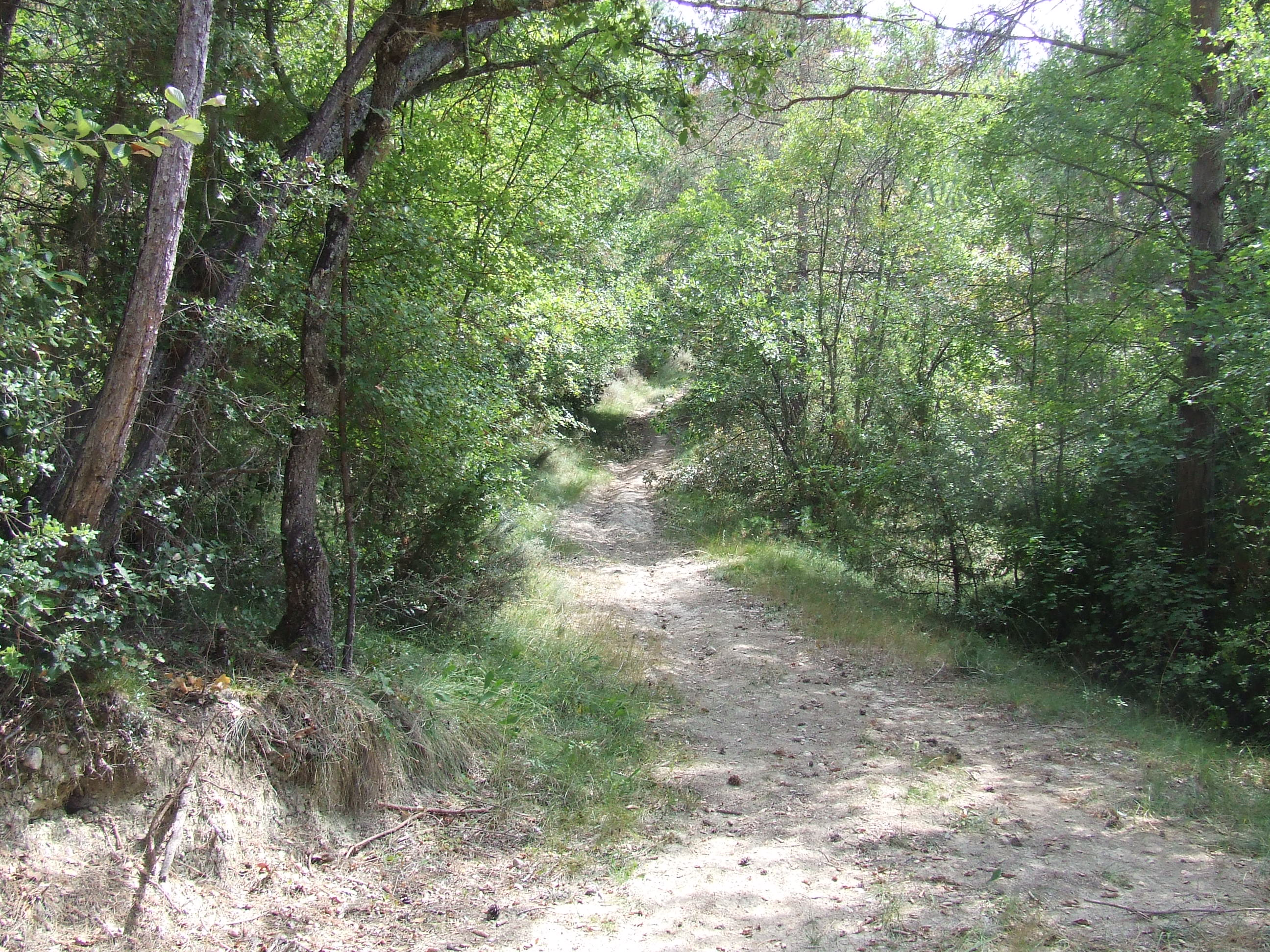 Poua de la Font del Barbot (Castellcir, Moianès)